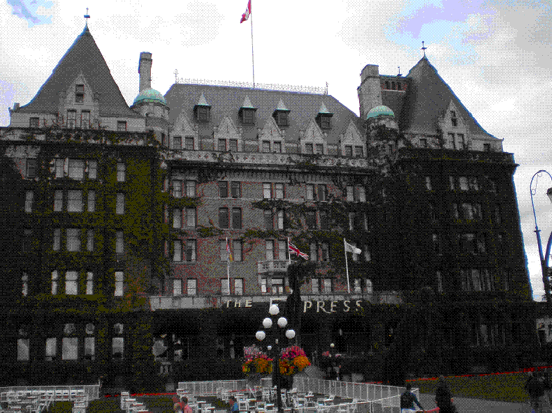 Ramonek egindako argazkia.